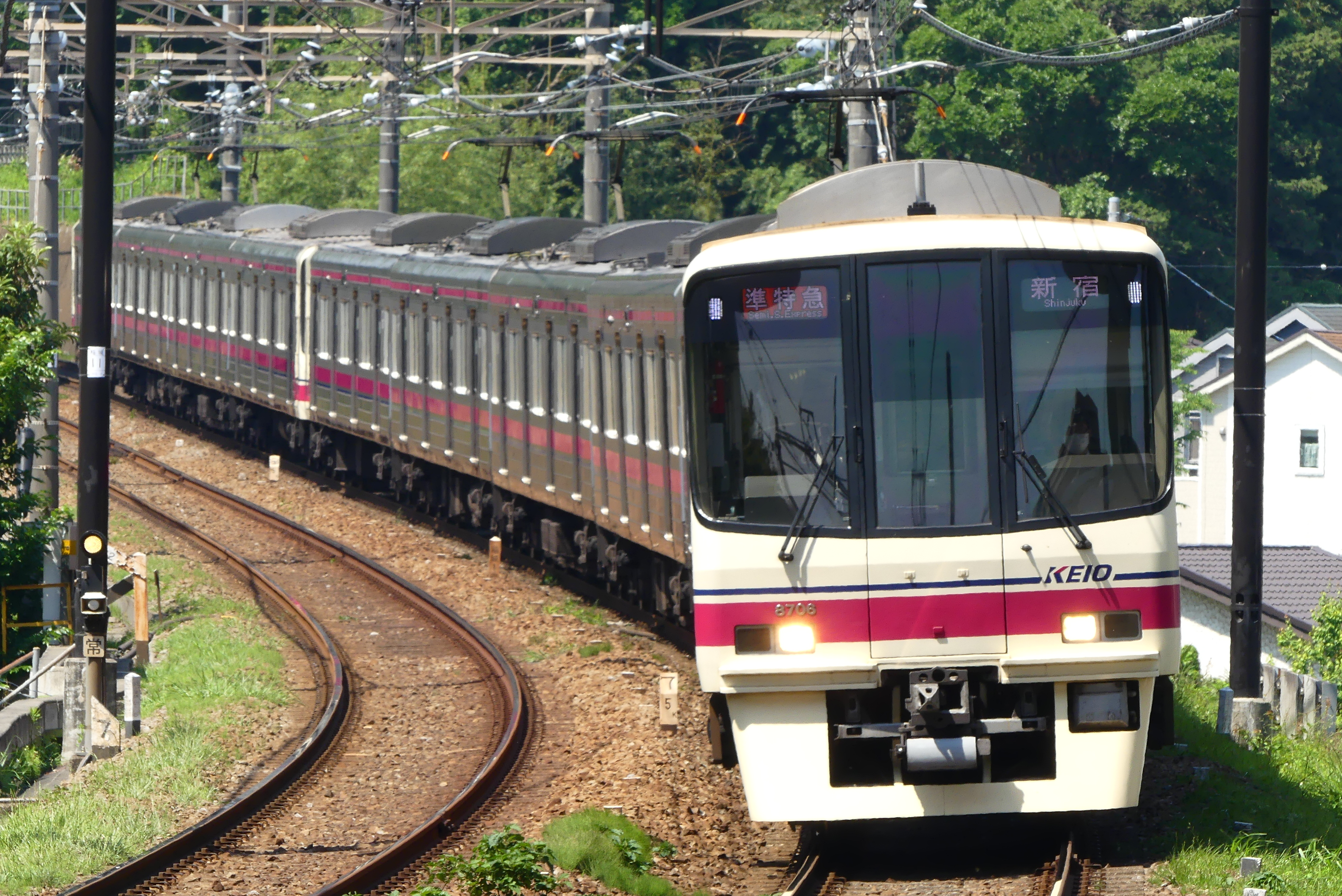 相模原線を走行する京王8000系電車